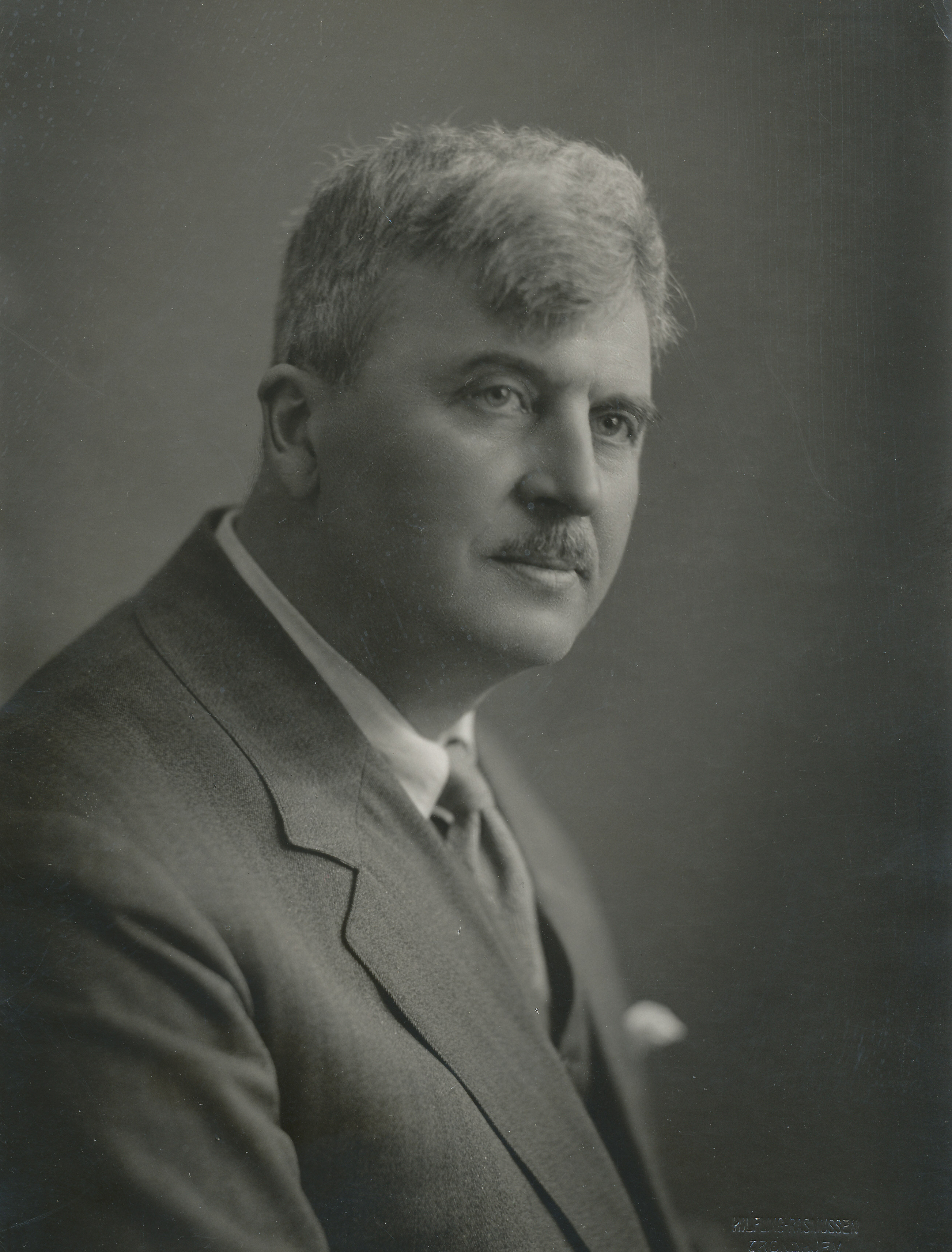 Format: Fotopositiv Dato / Date: ca. 1930 Fotograf / Photographer: Jens Carl Frederik Hilfling-Rasmussen (1869 - 1941) Sted / Place: Trondheim Wikipedia: Claus Hjelte (1884 - 1969) Digitalarkivet: Claus Hjeltes husstand i Innherredsveien 19 (Folketellingen 1900) Digitalarkivet: Claus Hjeltes karakterer ved Trondhjems Tekniske Læreanstalt (uteksaminert 1907) Eier / Owner Institution: Trondheim byarkiv, The Municipal Archives of Trondheim Arkivreferanse / Archive reference: Tor.H41.B25.F1733 Merknad: Arkitekt Claus Hjelte; f. 26.11.1884 i Fredrikshald (Halden), d. 1969.